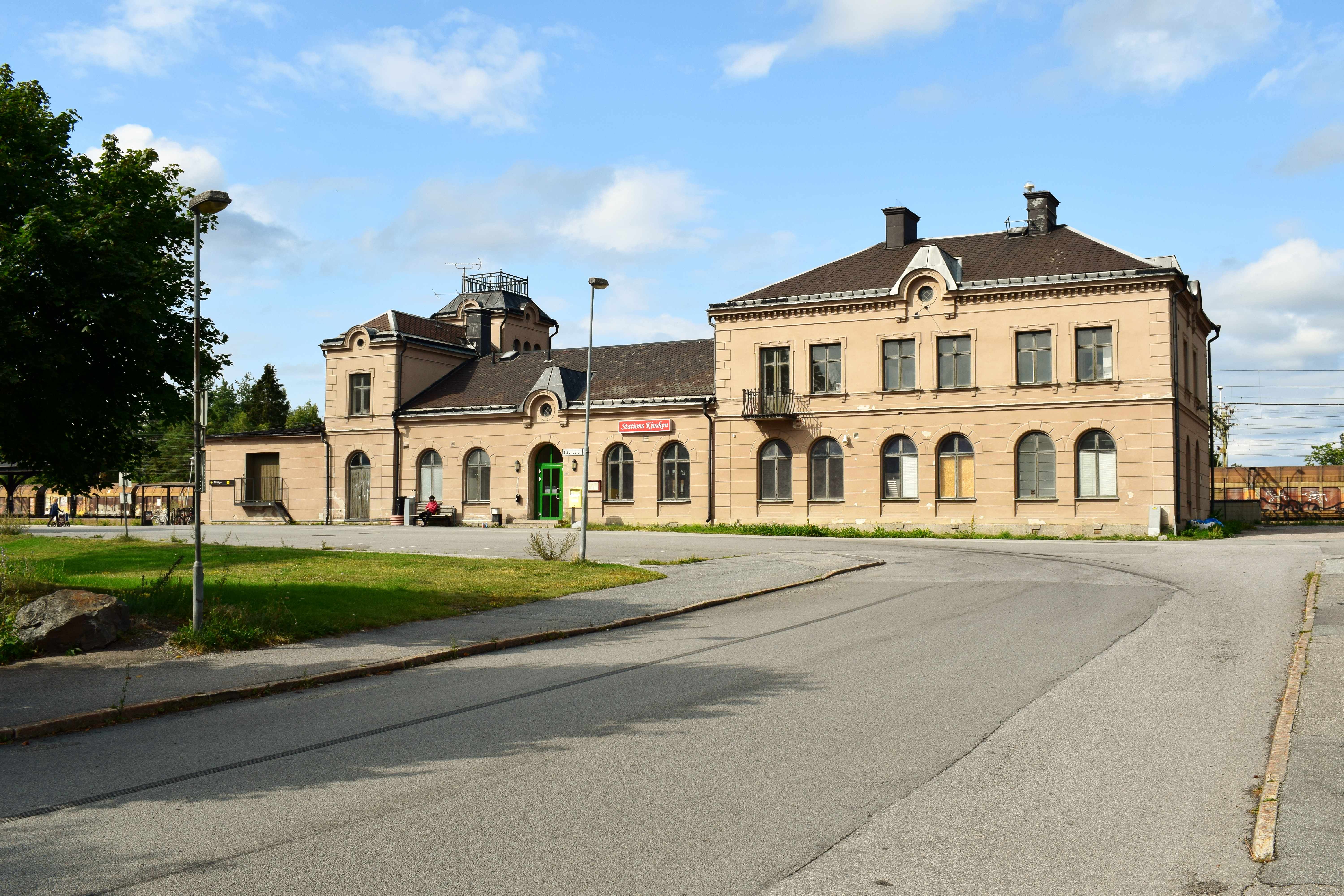 Järnvägsstation i Frövi i augusti 2019